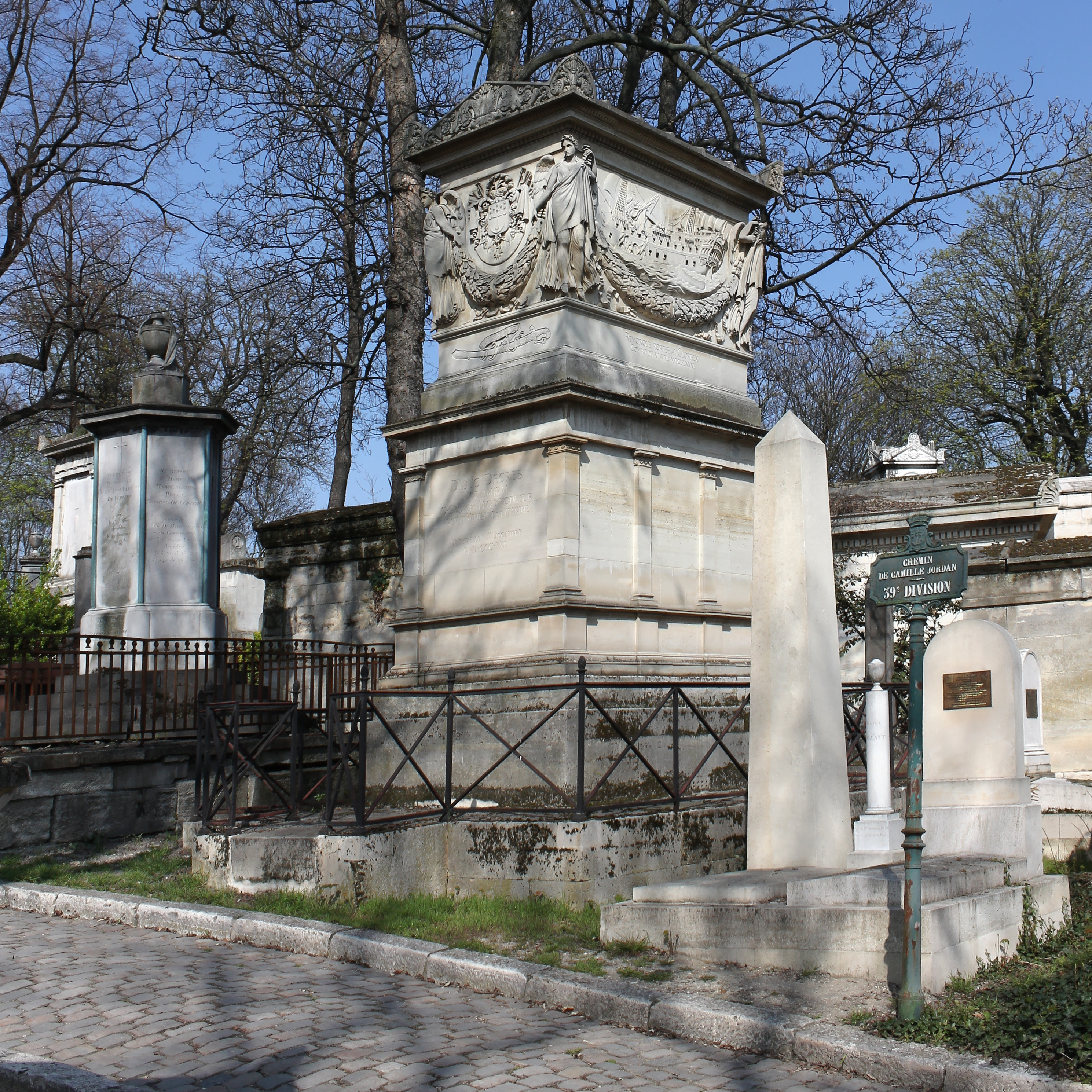 Sépulture de Denis Decrès (1761-1820), ministre de la Marine. Monument rectangulaire surmonté d'un cénotaphe décoré de guirlandes de lauriers et de génies ailés. Les quatre faces sont décorées de bas-reliefs. Face antérieure : blason et le sabre d'honneur. Face postérieure : ancre entourée d'un triton. Le bas-relief de la partie latérale de gauche représente le vaisseau Guillaume Tell lors du blocus de Malte le 30 mars 1800. Le bas-relief de la partie latérale de droite représente le vaisseau Glorieux le 12 avril 1782.vue d'ensemble